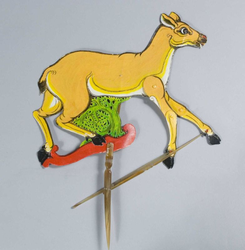 Schaduwpop. Wajang Kantjil pop dwerghert